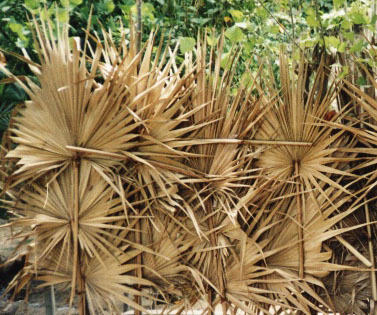 Shot by the user who uploaded it.